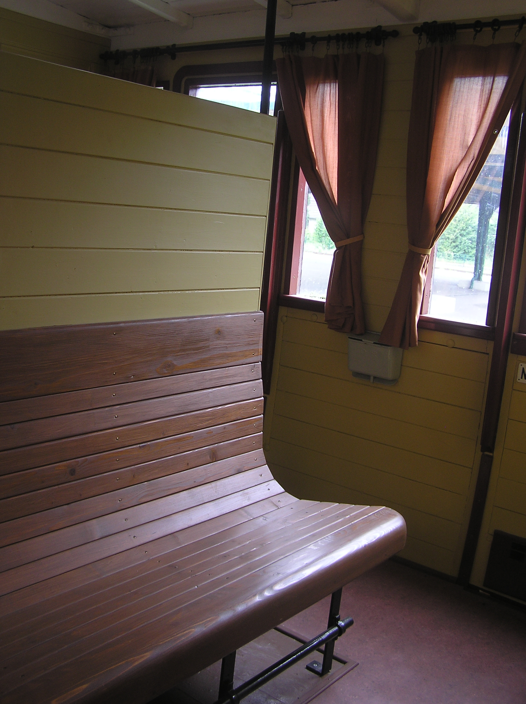 preuss_Abteilwagen_C3 (im Bahnhof Heringsdorf/Usedom) - 3. Klasse